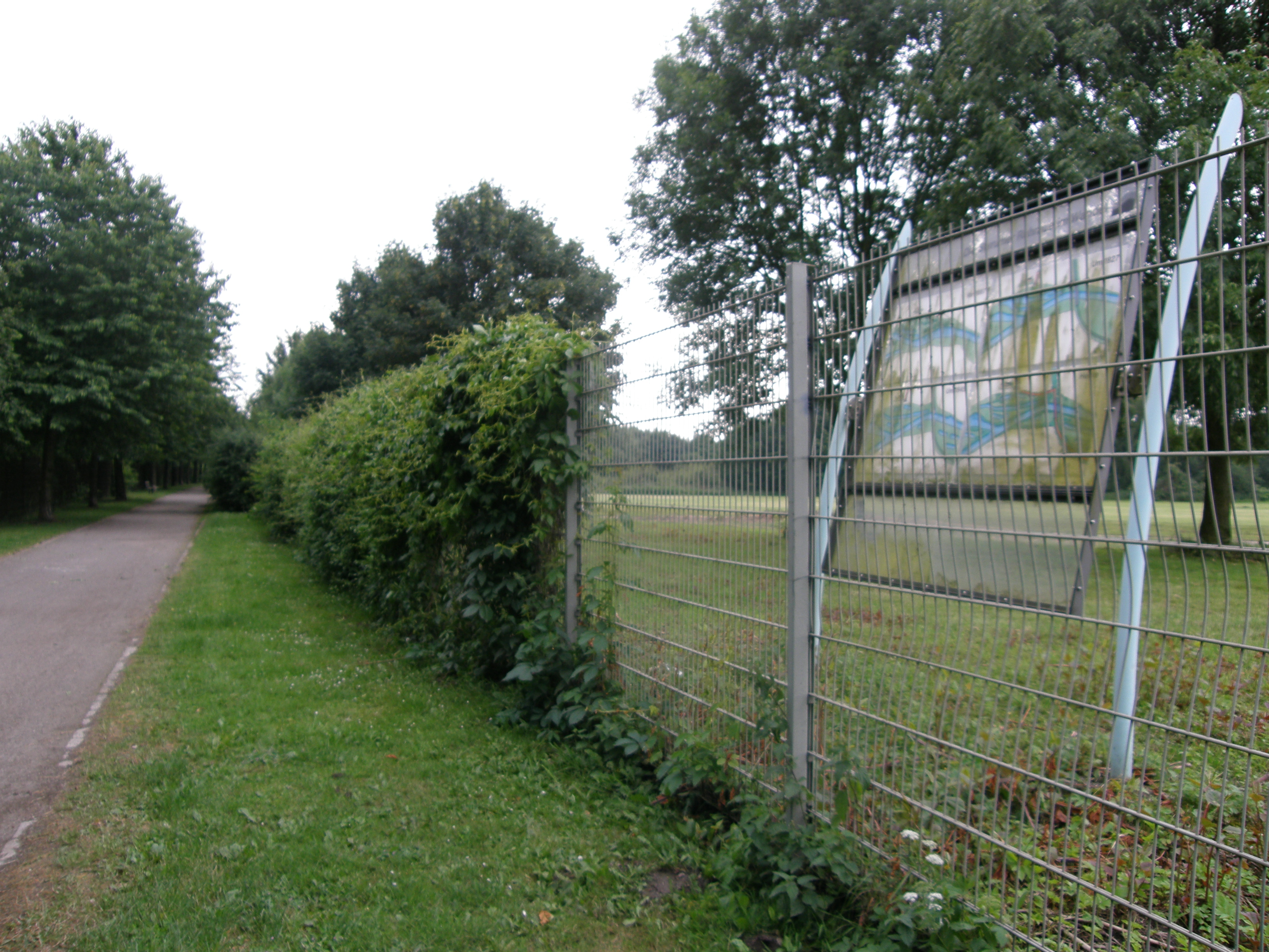 Beginn der Pfades am Aquarius, rechts eines der Informationsschilder